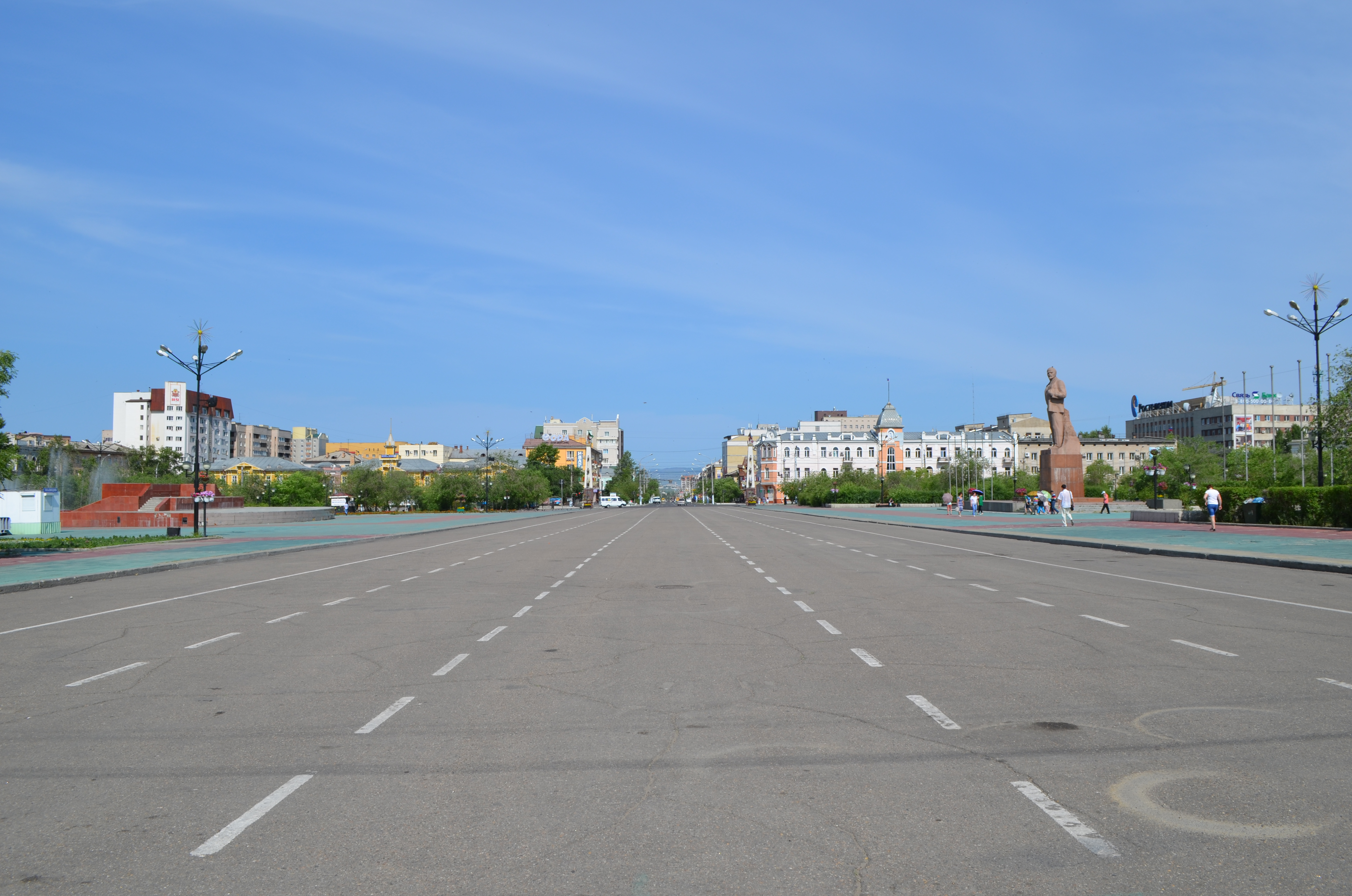 снимки конца июня - начала июля 2015 г.